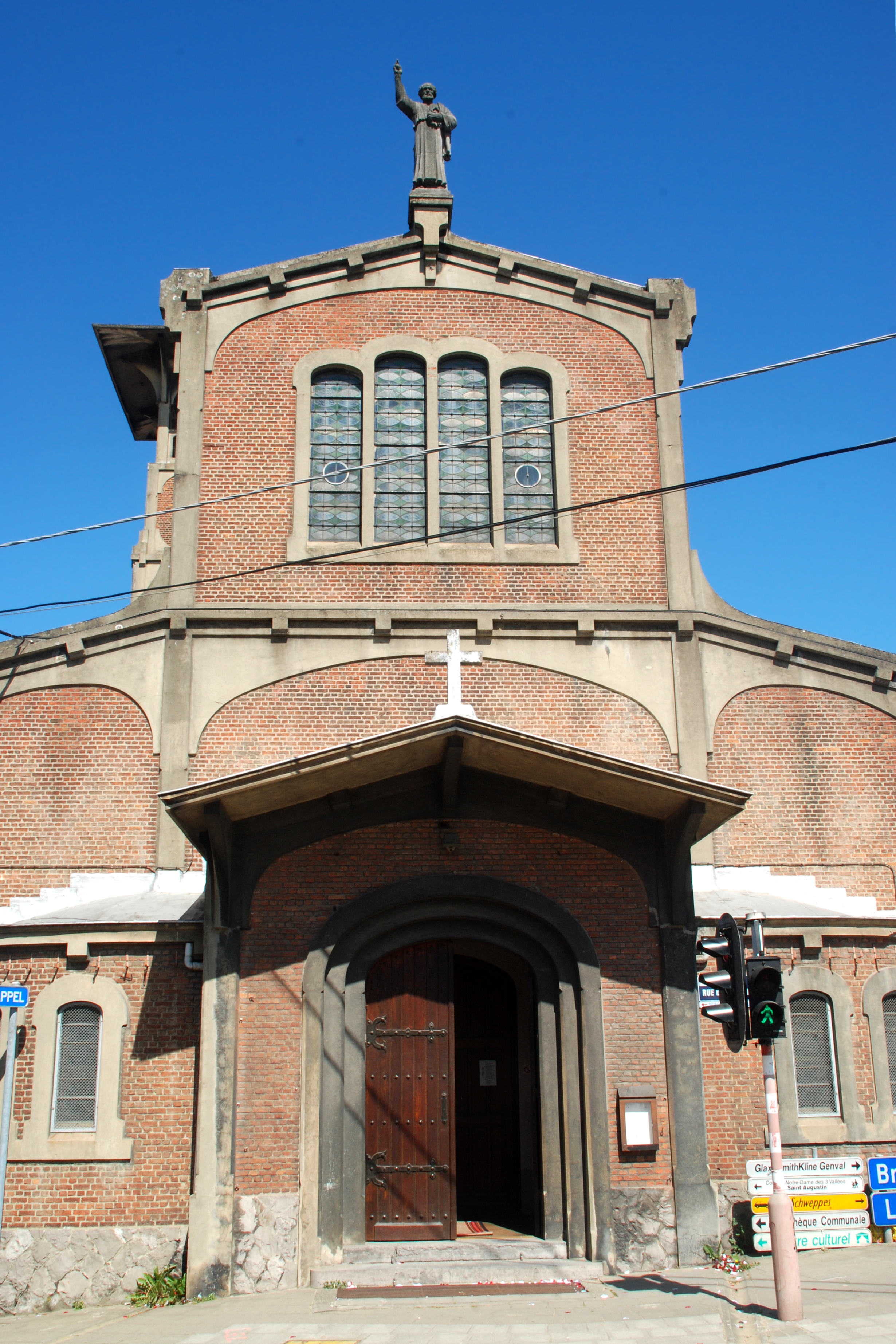 Belgique - Brabant wallon - Rixensart - Genval - Église Saint-Pierre de Maubroux